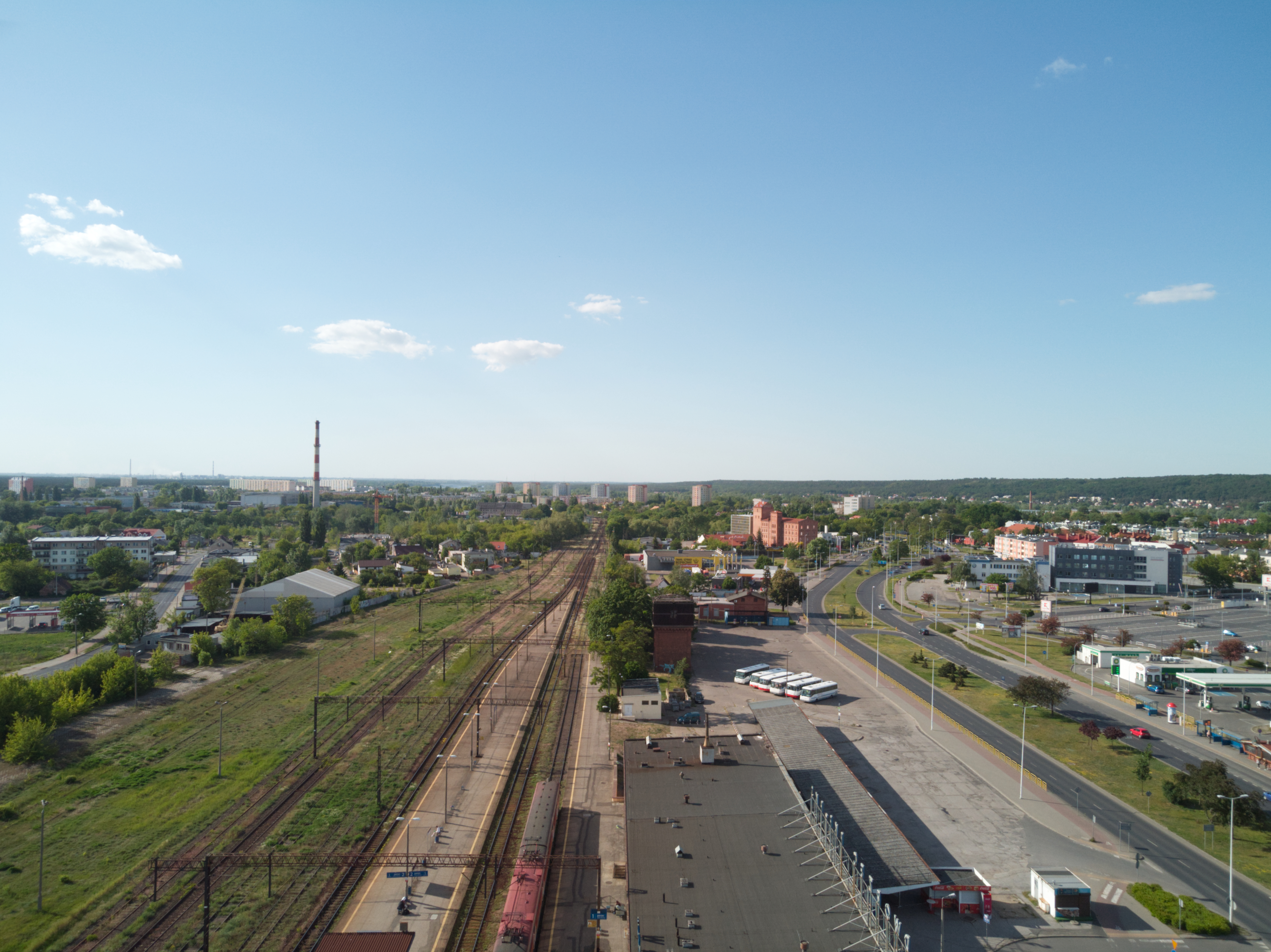 Styk Południa ze Śródmieściem (2020 r.)